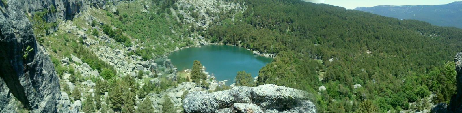 Vista general de la Laguna Negra de Urbión